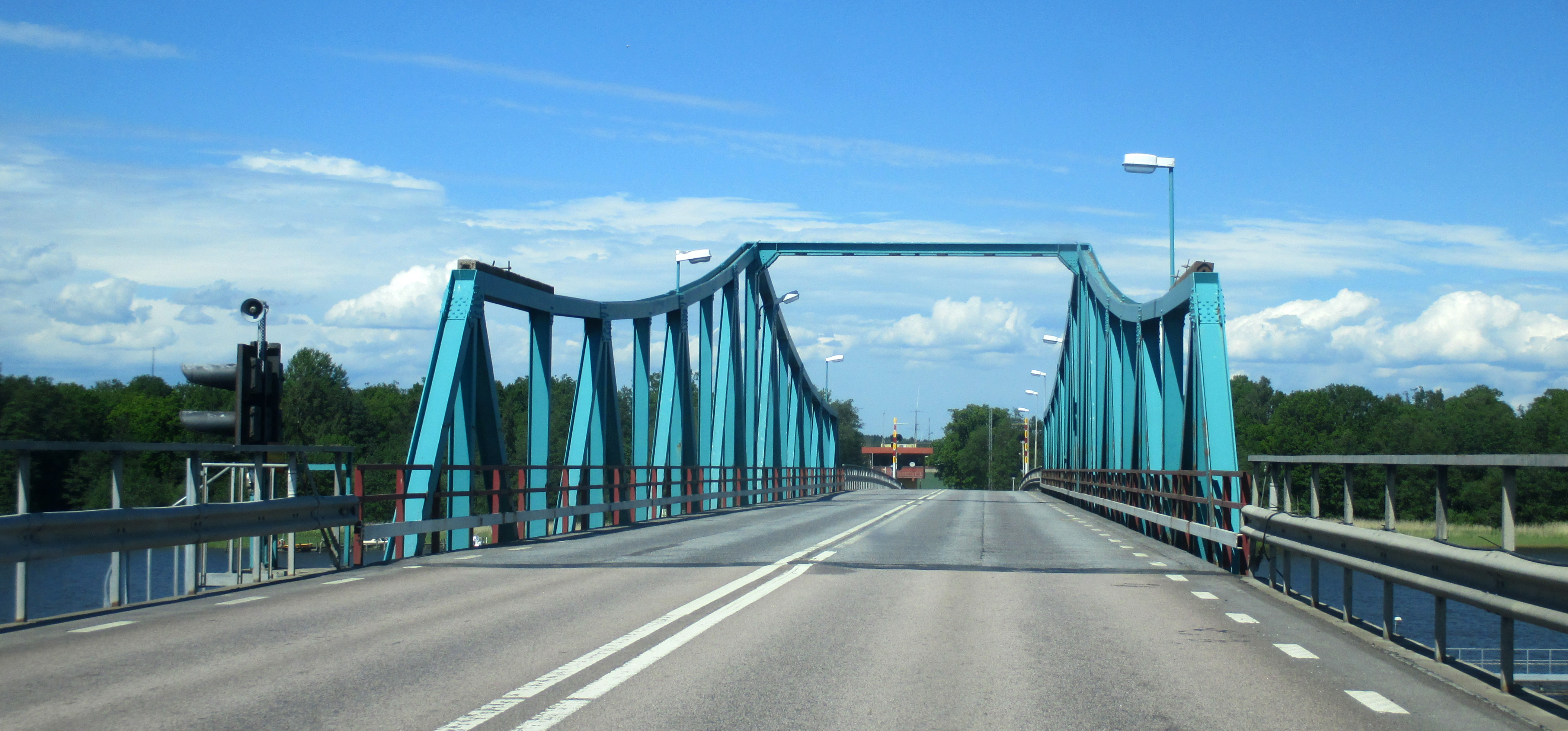 Hjulstabron där Riksväg 55 går över Hjulstafjärden, Enköpings-Näs socken, Enköpings kommun, Uppsala län, Uppland, Sverige.